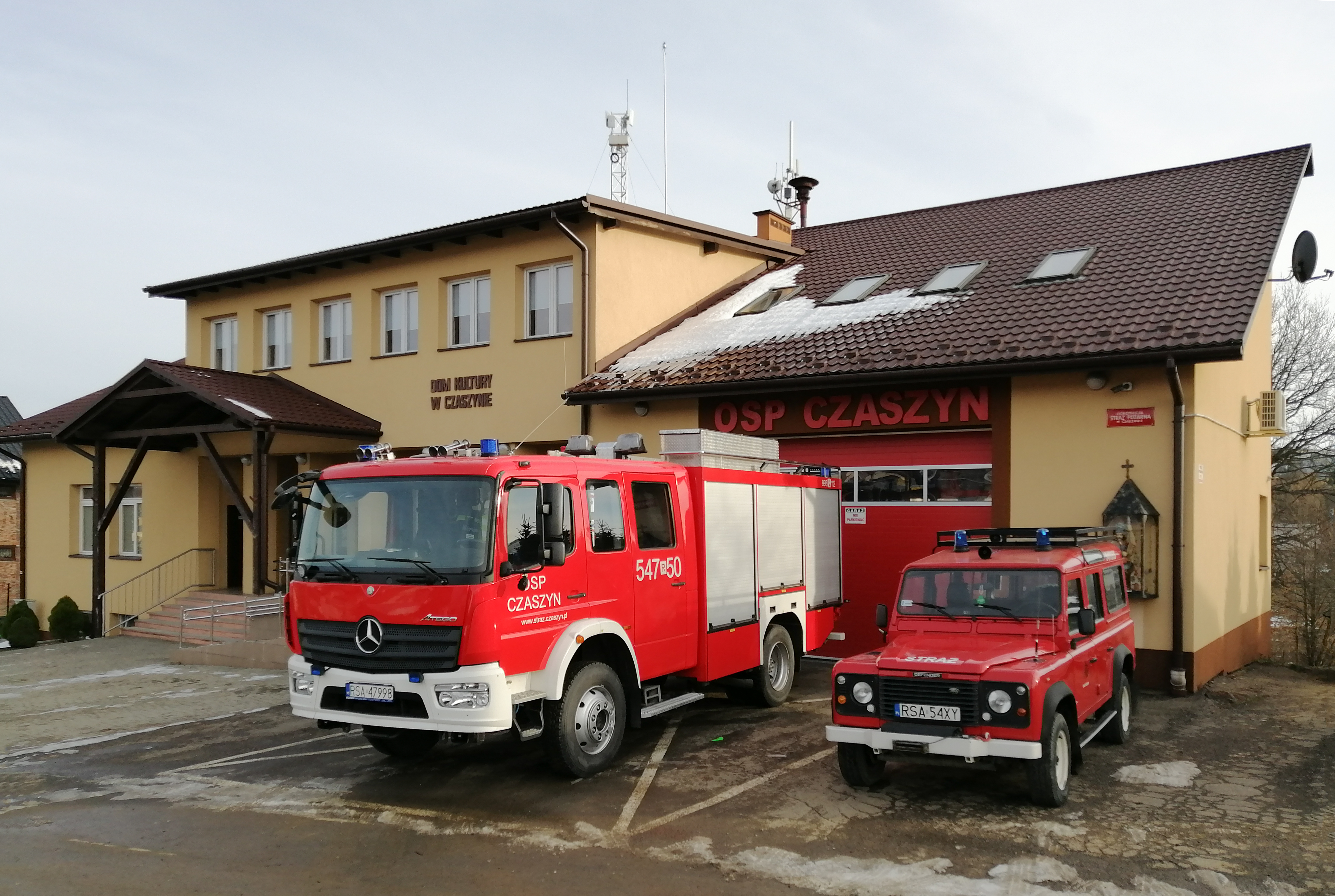 Samochody OSP CZASZYN przed remizą. Mercedes Atego - 547[R]50 i Land Rover Defender 110 Td5 - 547[R]55